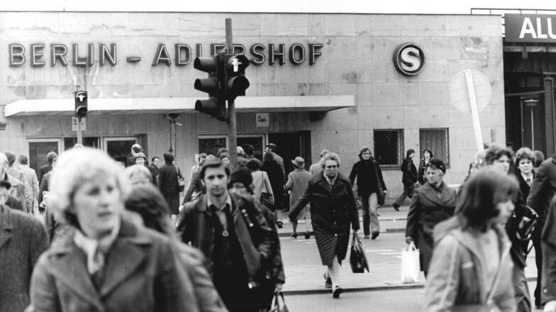 ADN-ZB-ZB-27.4.78-Hü-Berlin: Verkehrssünder- Die Fahrbahn noch bei "Rot" zu überqueren ist lebensgefährlich! Die Straßenverkehrsordnung fordert von allen Verkehrsteilnehmern Verantwortungsbewußtsein, Disziplin und Aufmerksamkeit. Über 20 Prozent der Verkehrsunfälle werden schuldhaft von Fußgängern verursacht."